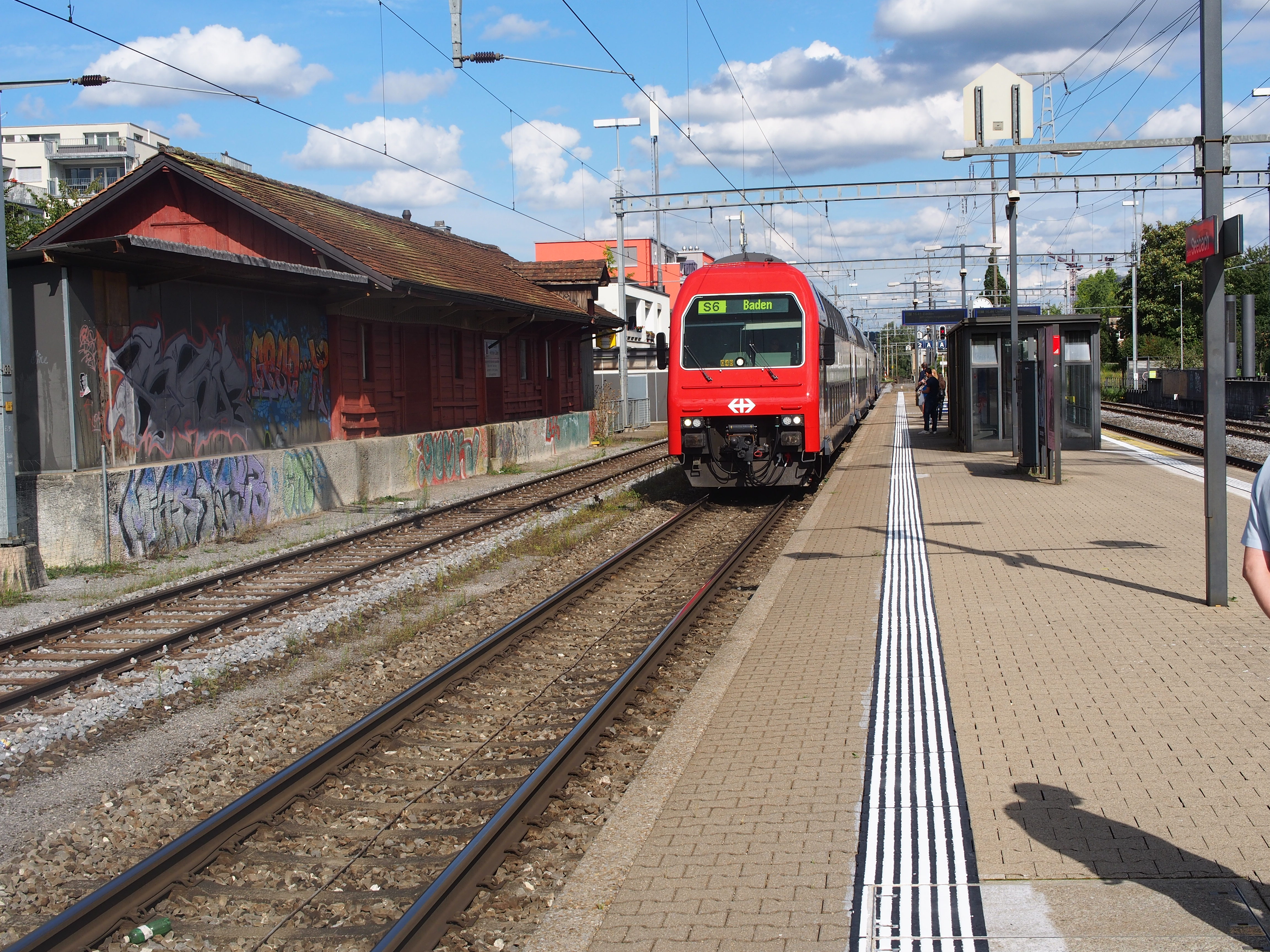 Einfahrt S-Bahn im Bahnhof Seebach